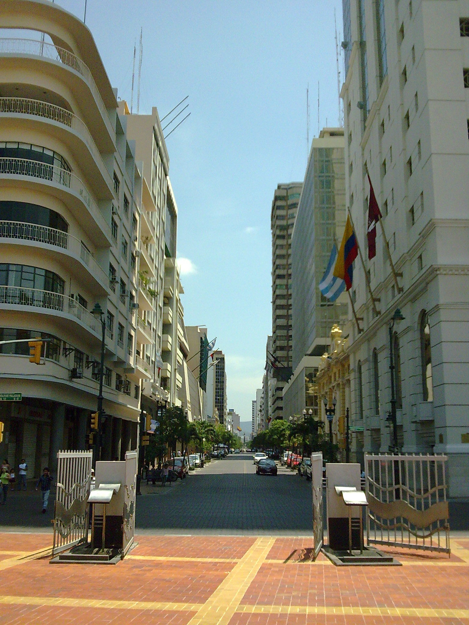 Imagen de la Avenida Nueve de Octubre desde el Malecón 2000.